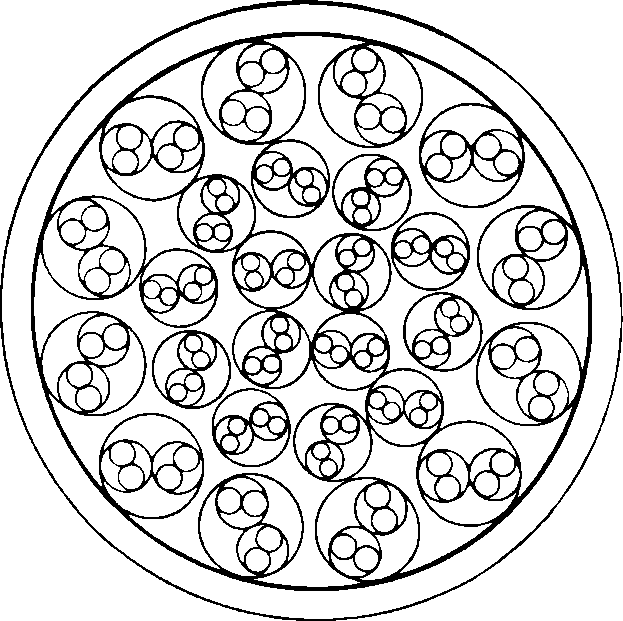 Schnittzeichnung Fernkabel, 26 Vierer in Dieselhorst-Martin-Verseilung.